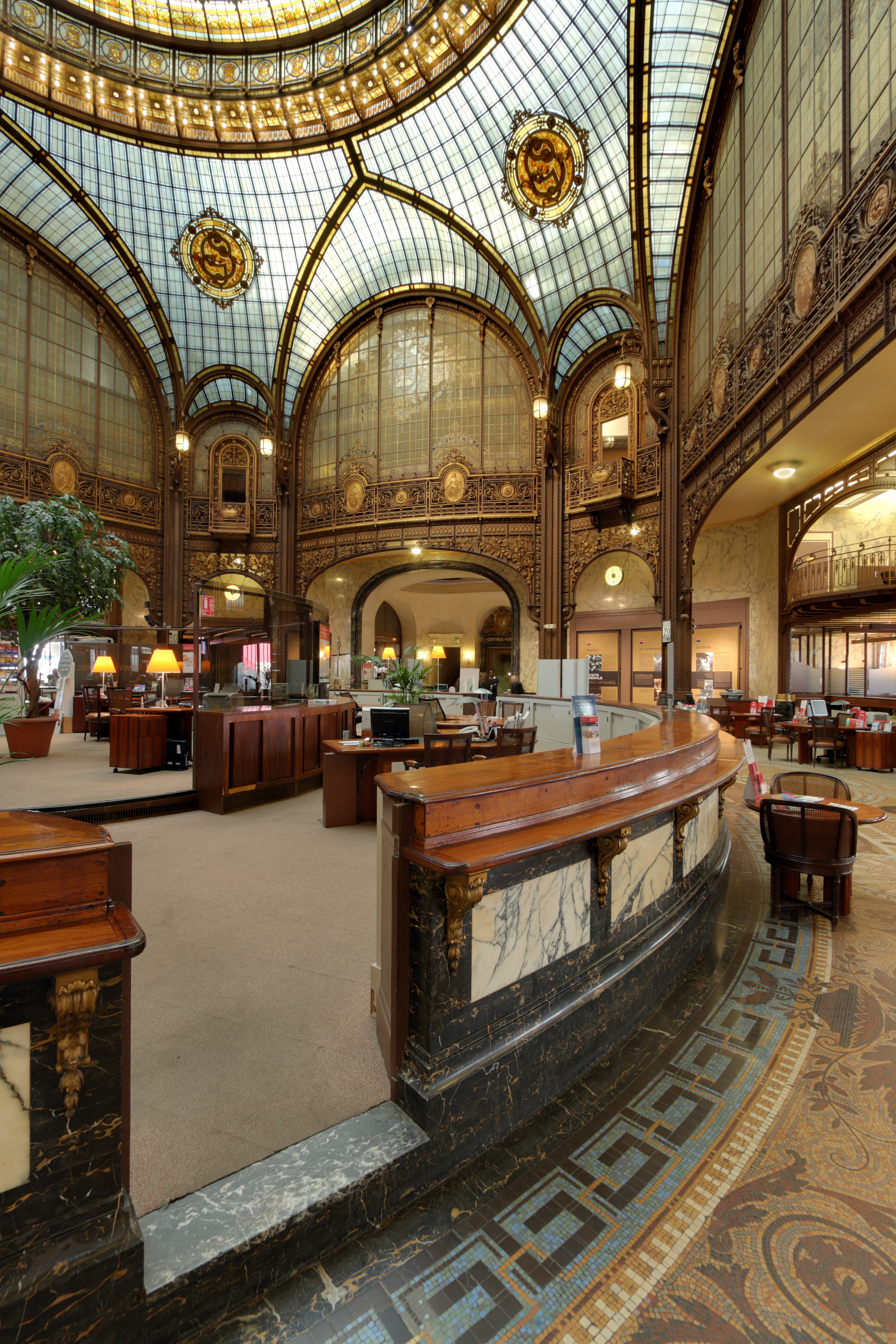 Agence centrale de la banque Société Générale, au 29 boulevard Haussman, 75008 Paris. L'agence a été aménagée par l'architecte Jacques Hermant (1855-1930) à partir de 7 immeubles mitoyen rachetés par la banque en 1905. Ouverte en 1912, l'agence est célèbre pour sa verrière à charpente métallique, dont on aperçoit une petite partie sur cette image. Les guichets circulaires, dits "Fromage", occupent une grande partie du milieu de la salle.